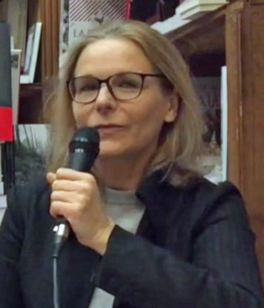 Extrait d'une vidéo de la rencontre avec Camille Laurens à l'occasion de la sortie de son roman "Celle que vous croyez", animée par Oriane Jeancourt Galignani (rédactrice en chef littérature au magazine TRANSFUGE), proposée par le magazine TRANSFUGE et la Librairie Delamain